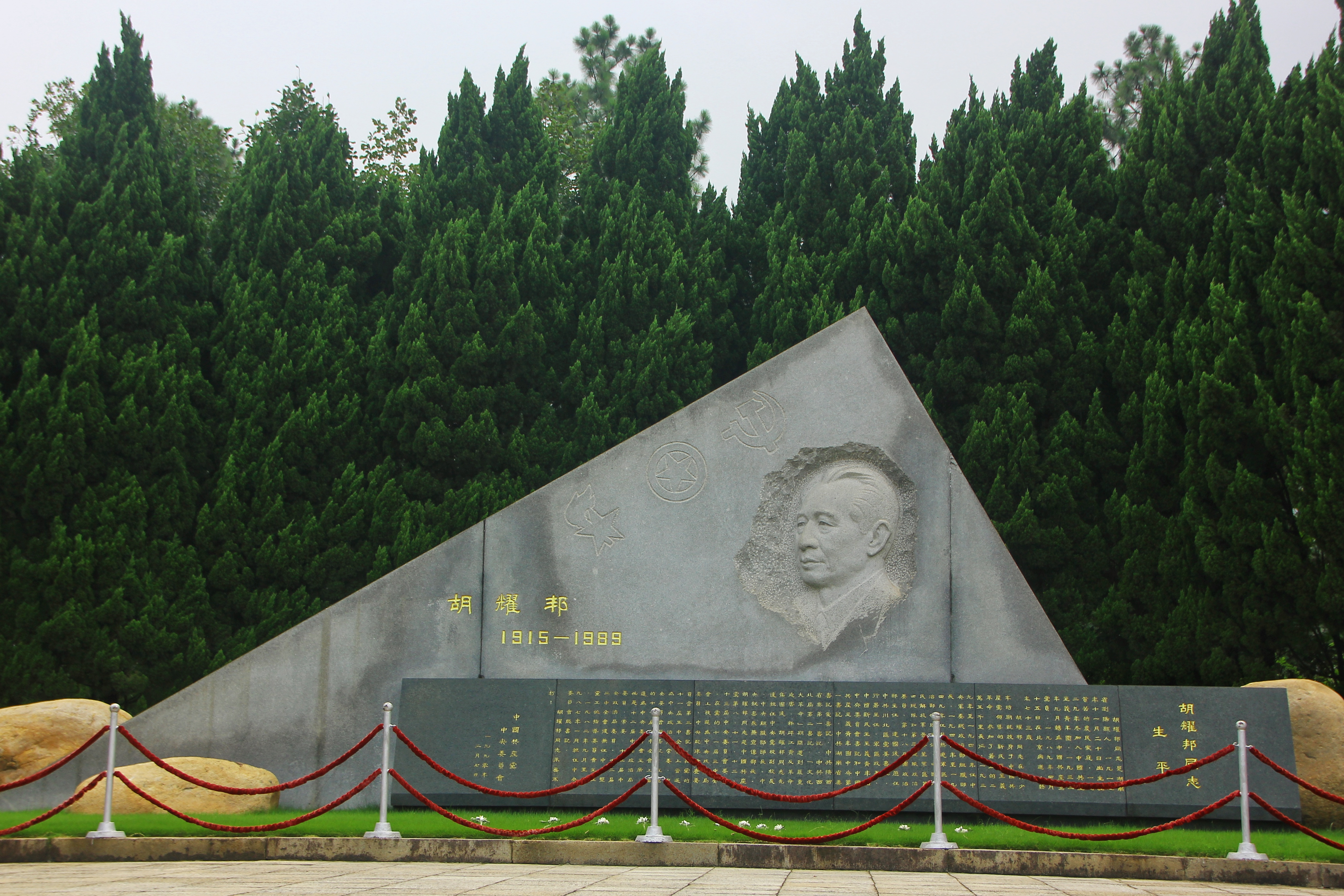 中文（中国大陆）: 胡耀邦墓及墓碑，墓碑上刻有中共中央发出胡耀邦逝世讣告